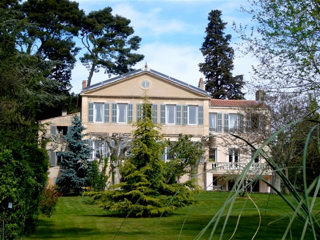 Bastide de la La Royante à Aubagne en Provence, France